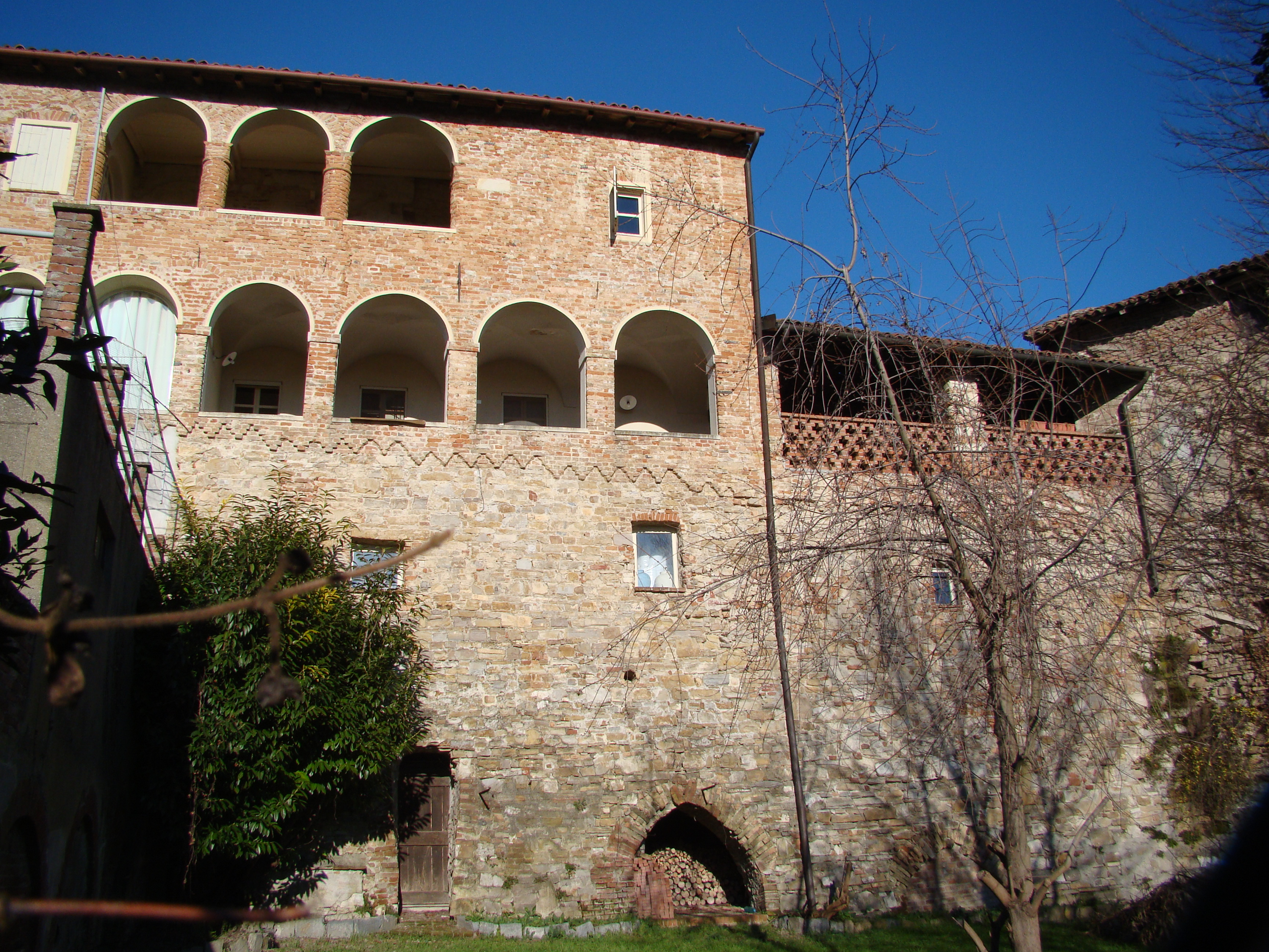 tratto antiche mura